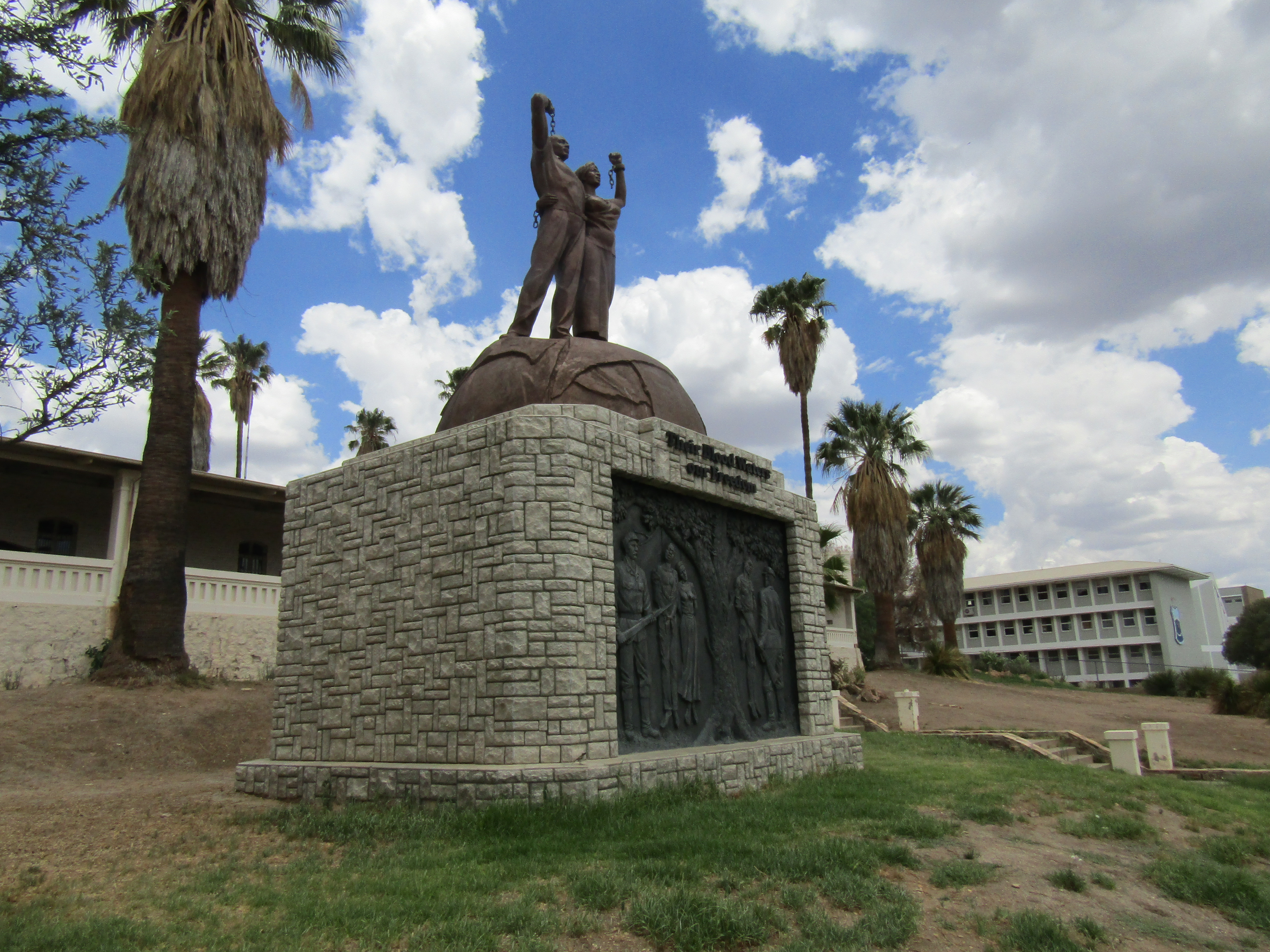 Genozid-Denkmal vor der Alten Feste in Windhoek